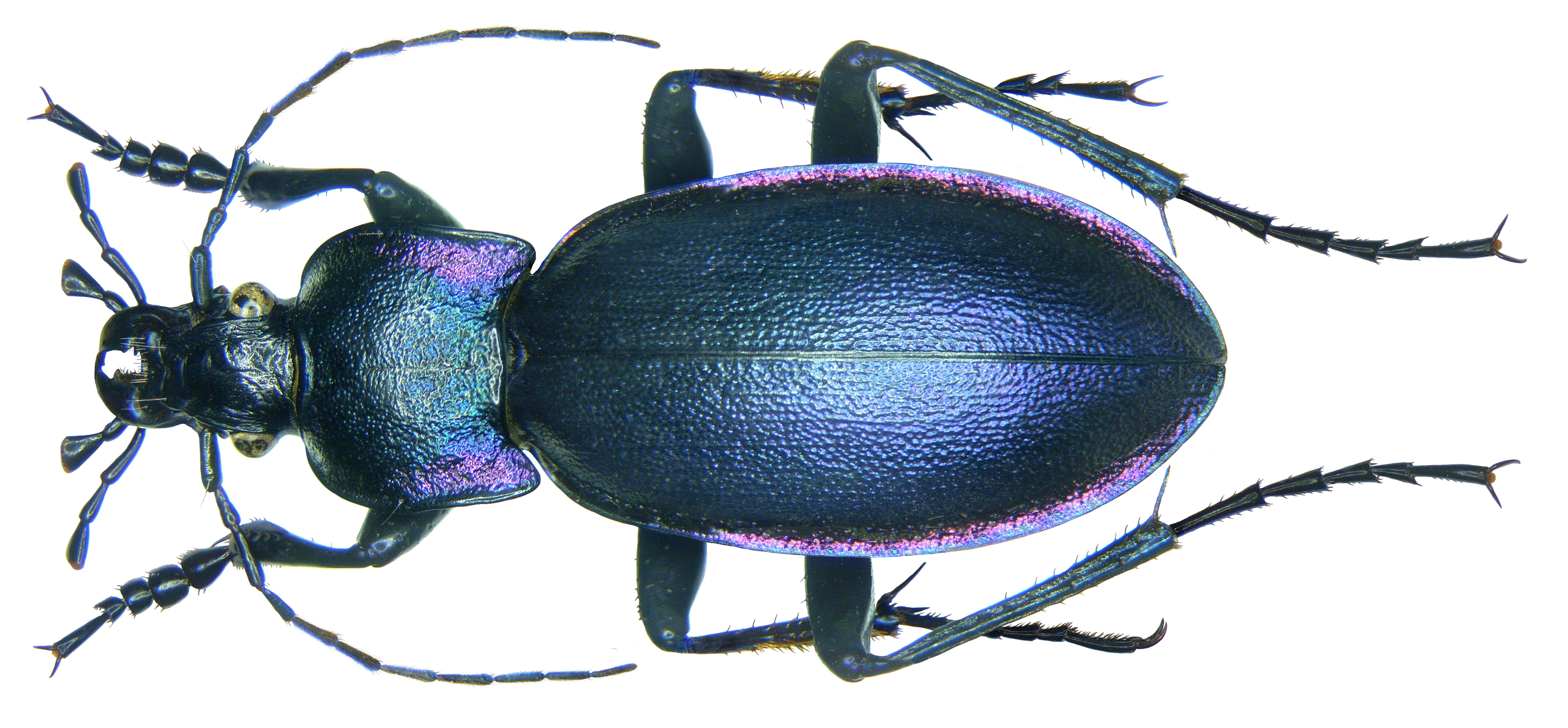 Familie: Carabidae Grösse: 26-30 mm Verbreitung: Italien Fundort: Italia, Marche Pesaro leg. det. K.Staven, 1998 Foto: U.Schmidt, 2008